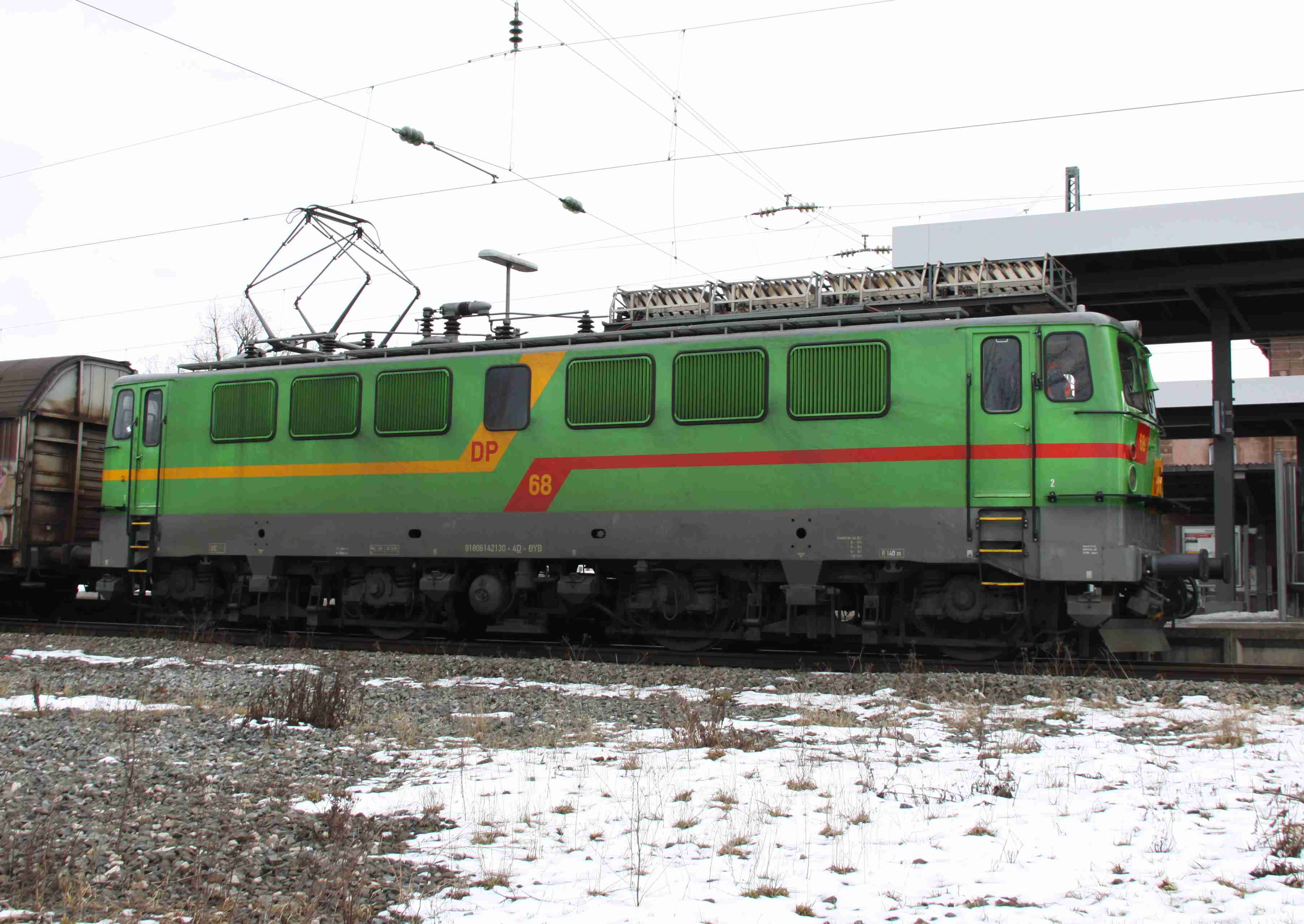 142 130 der BayernBahn in Gunzenhausen